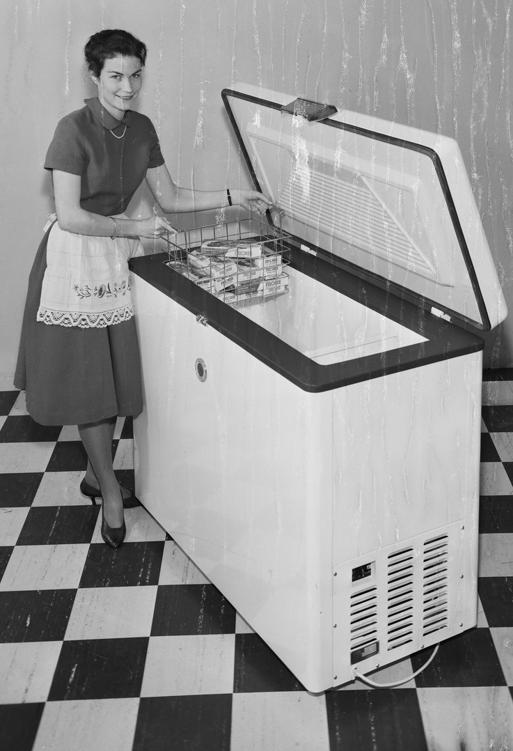 reklameopptak, Standard dypfryser, kvinne, modell.